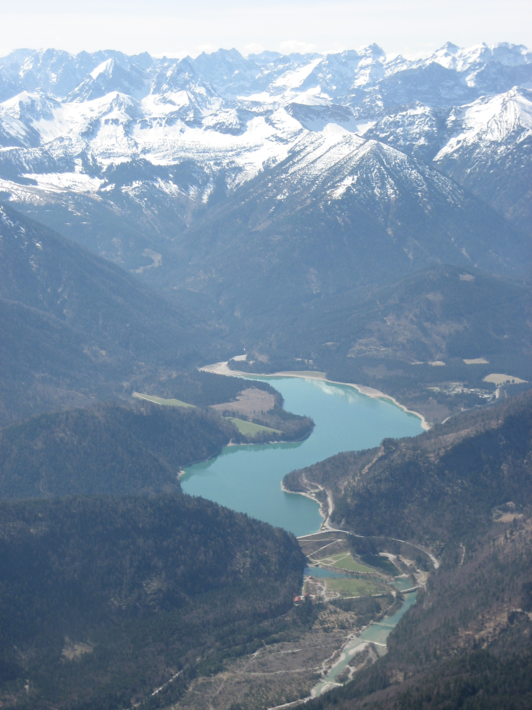 Luftbild des Sylvensteinspeichers